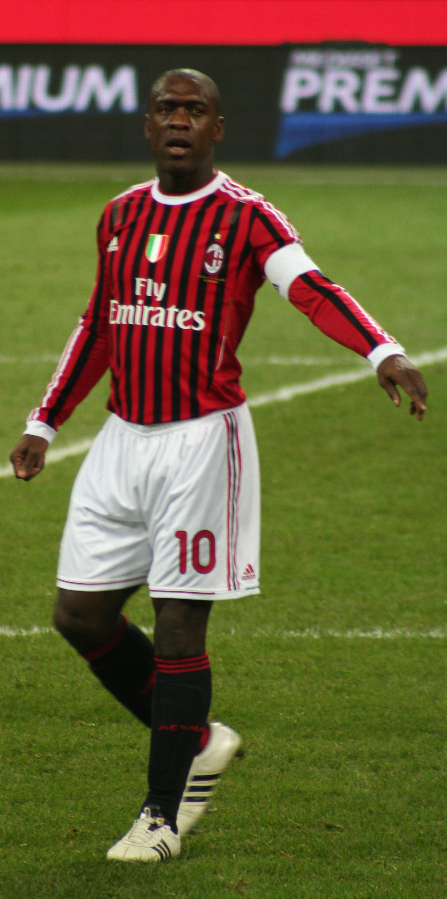 Seedorf. Partita Milan-Siena stagione 2011-2012